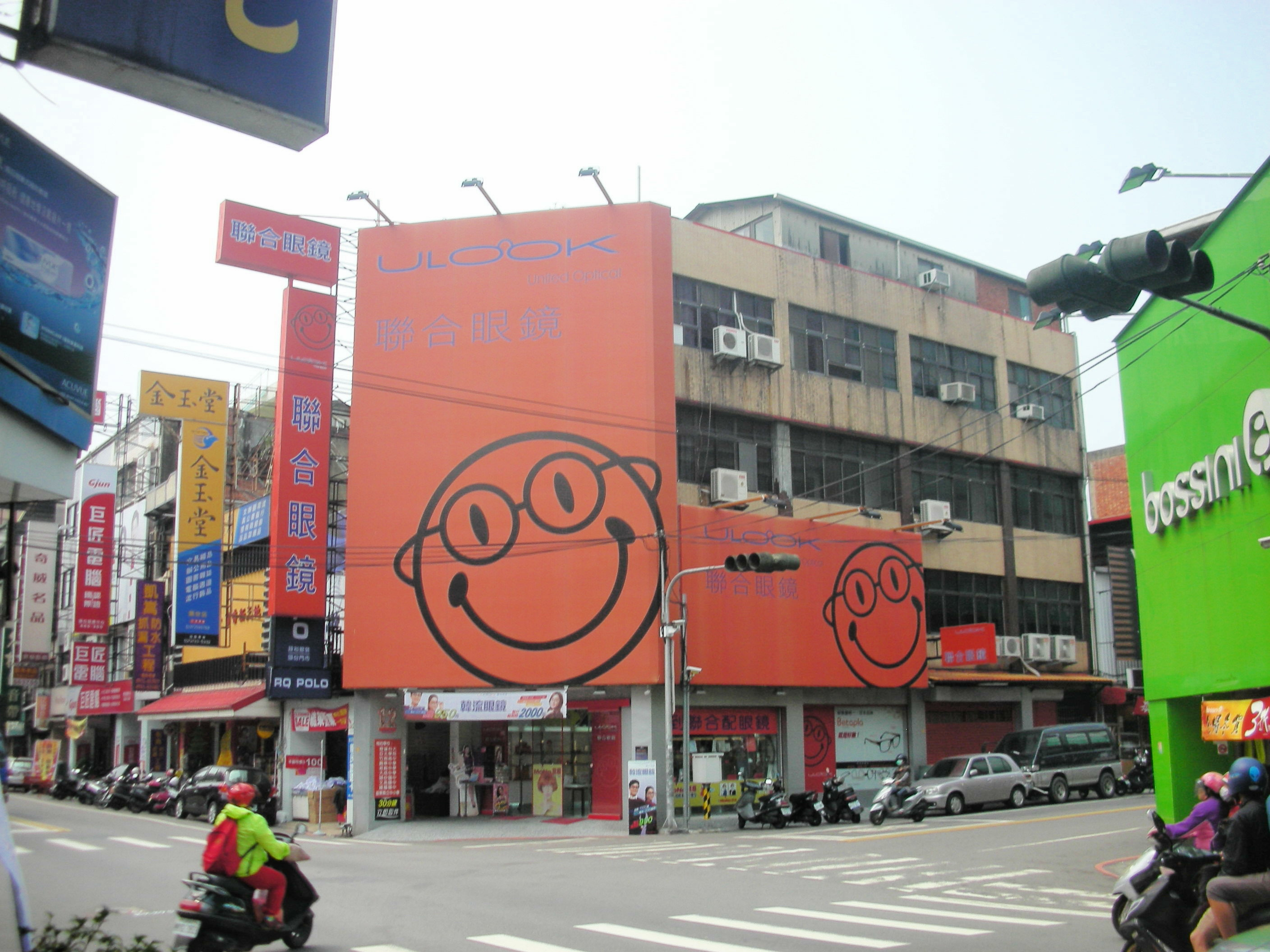 頭份街景